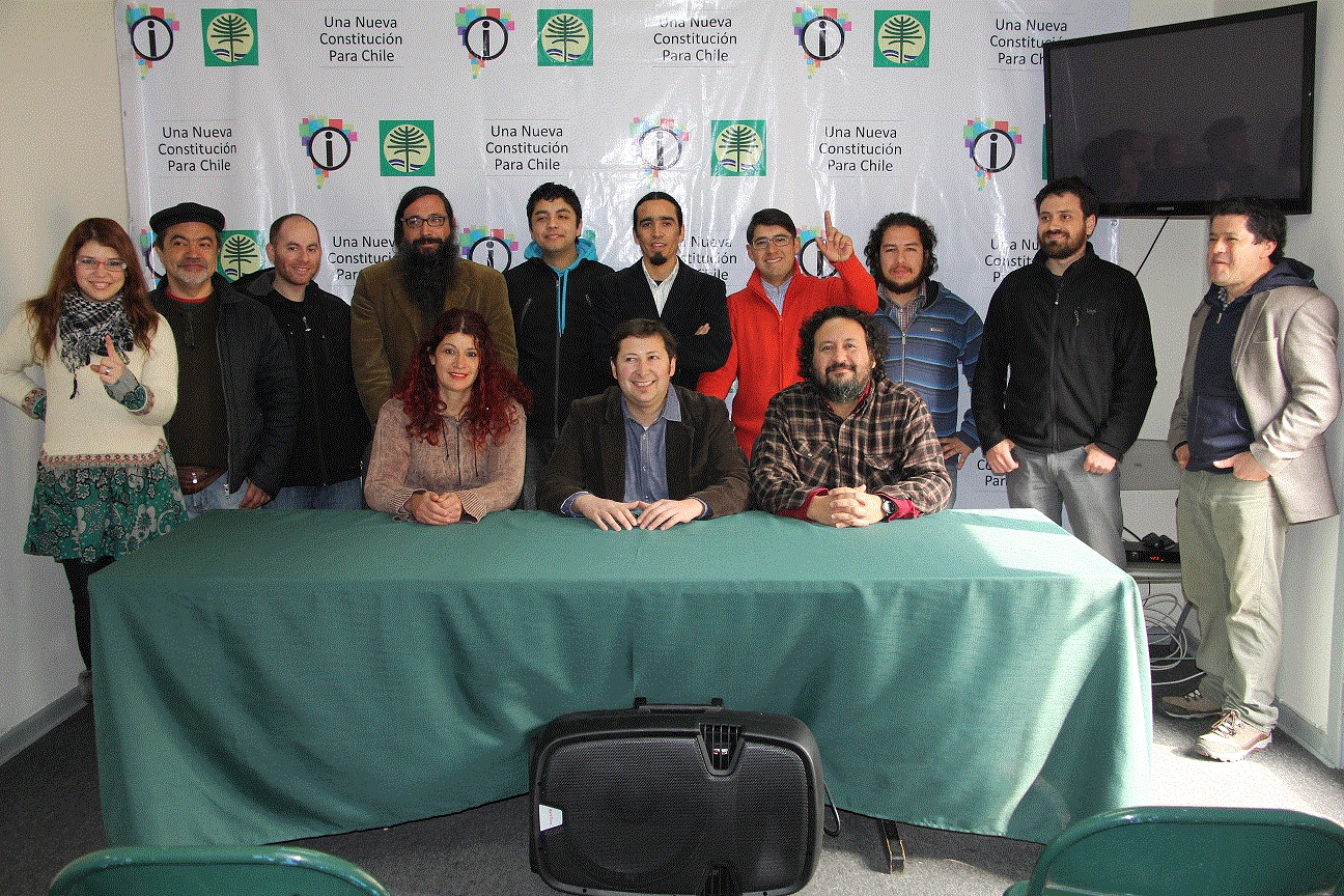 "Partido Ecologista y Partido Igualdad acuerdan pacto para enfrentar proceso electoral de noviembre". El pacto se denomina "Una Nueva Constitución para Chile".